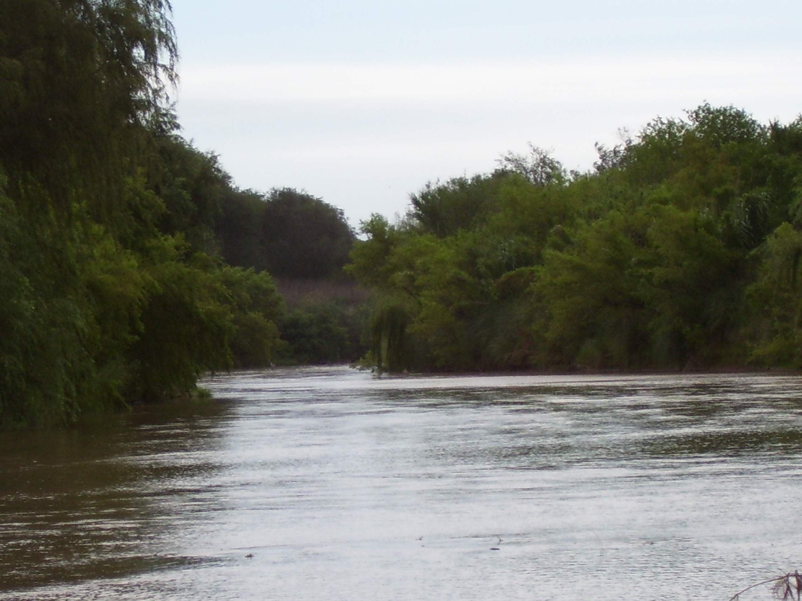 Río Chocancharava junto de La Carlota, Córdoba, Argentina